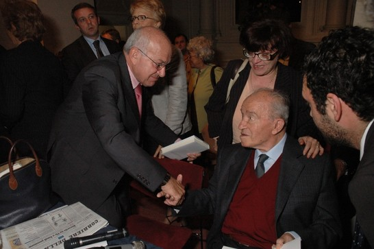 Presentazione del libro di Pietro Ingrao "Volevo la luna"